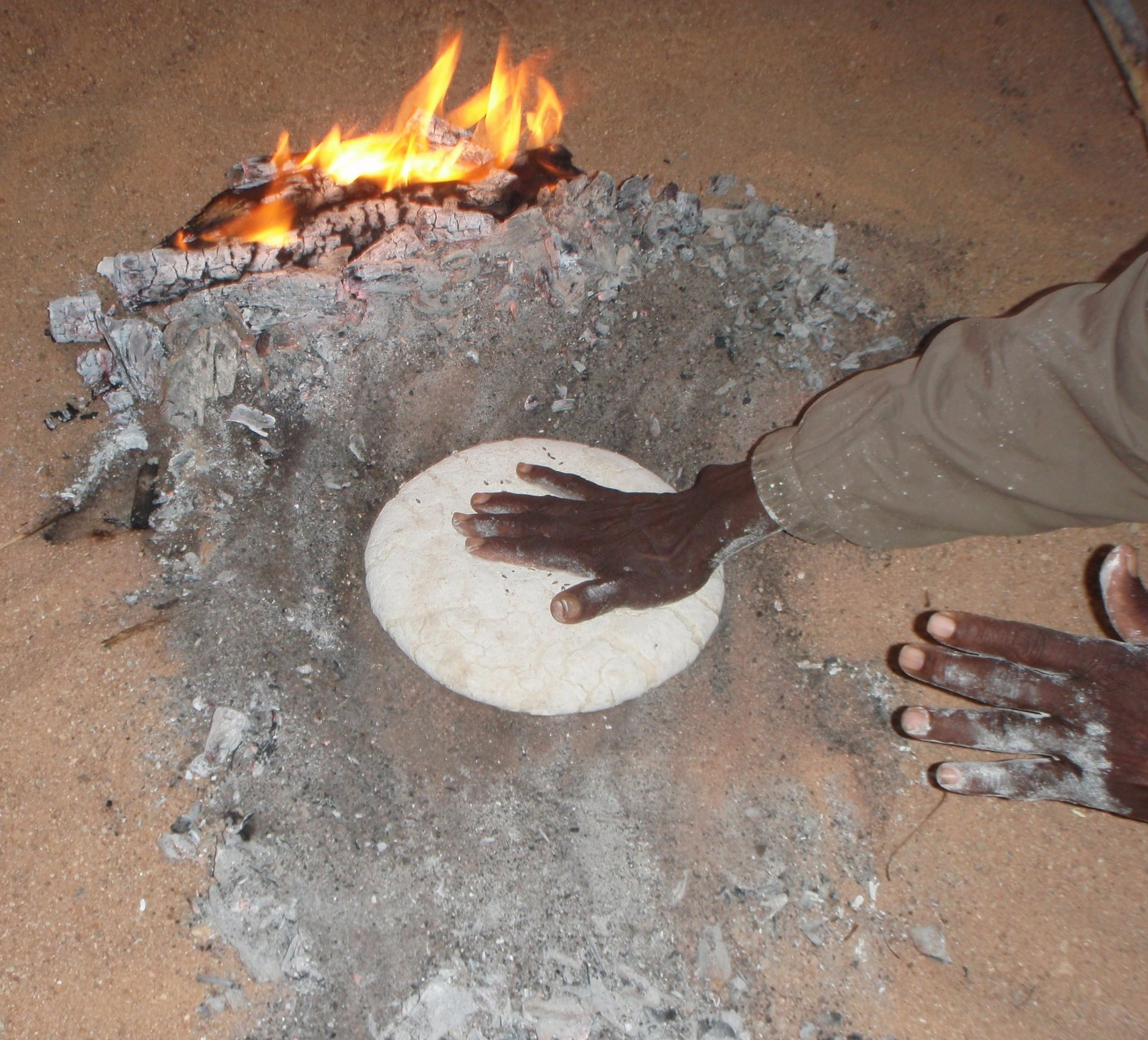 PB190376.JPG